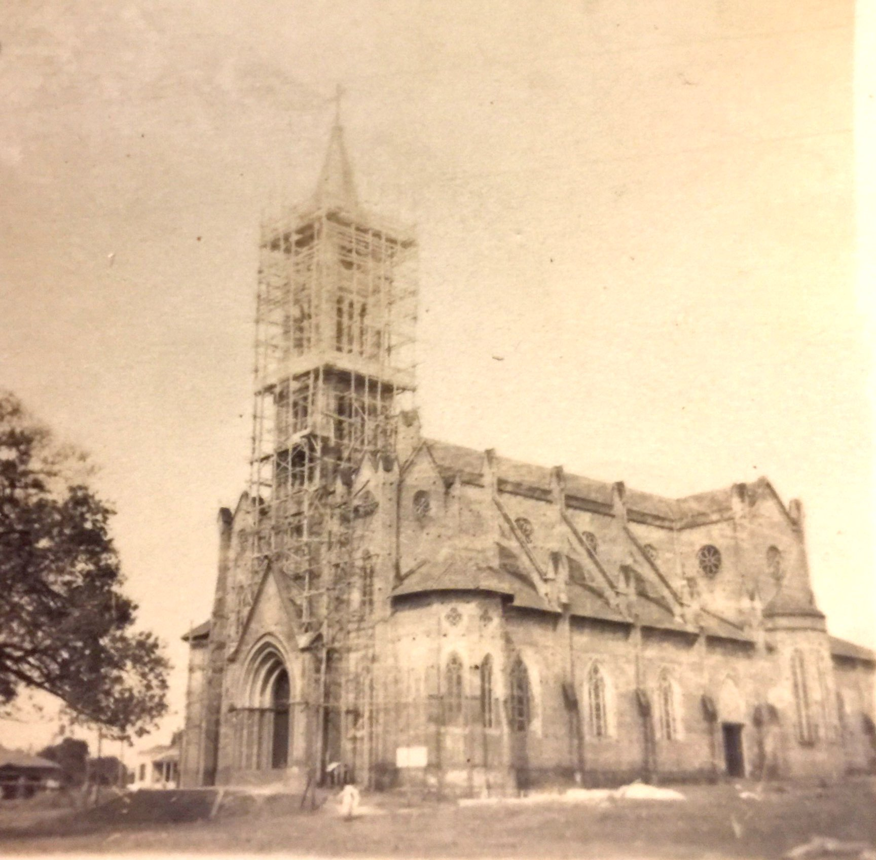 Igreja Matriz de Taquaritinga em reforma da torre pelo engenheiro Francisco Perotti, italiano de San Germano Versellese, cujo pai, Pietro Perotti também era reconhecido construtor de arcos de igrejas.